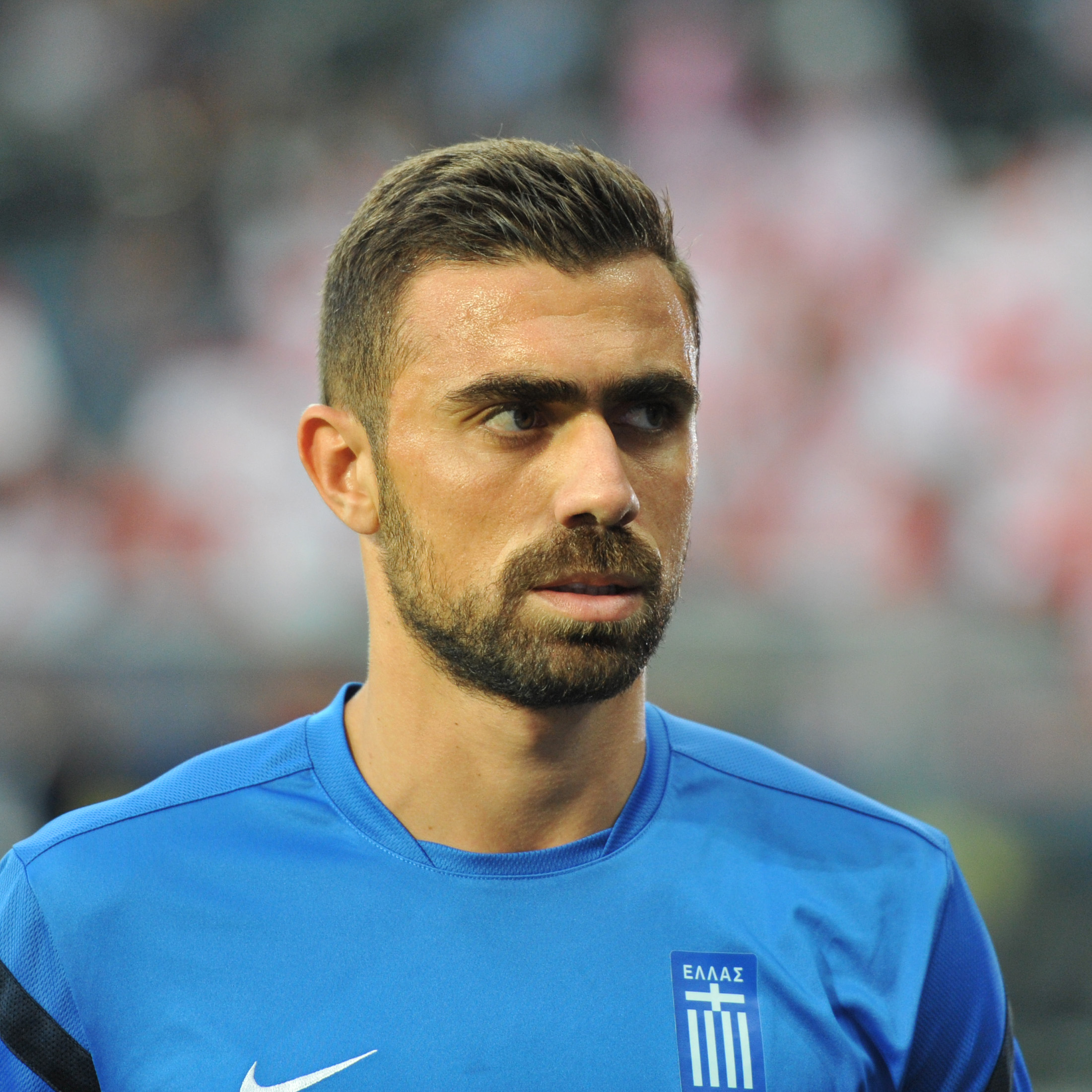 Freundschaftliches Länderspiel Österreich - Griechenland am 14. August 2013 in Salzburg: Giannis Maniatis